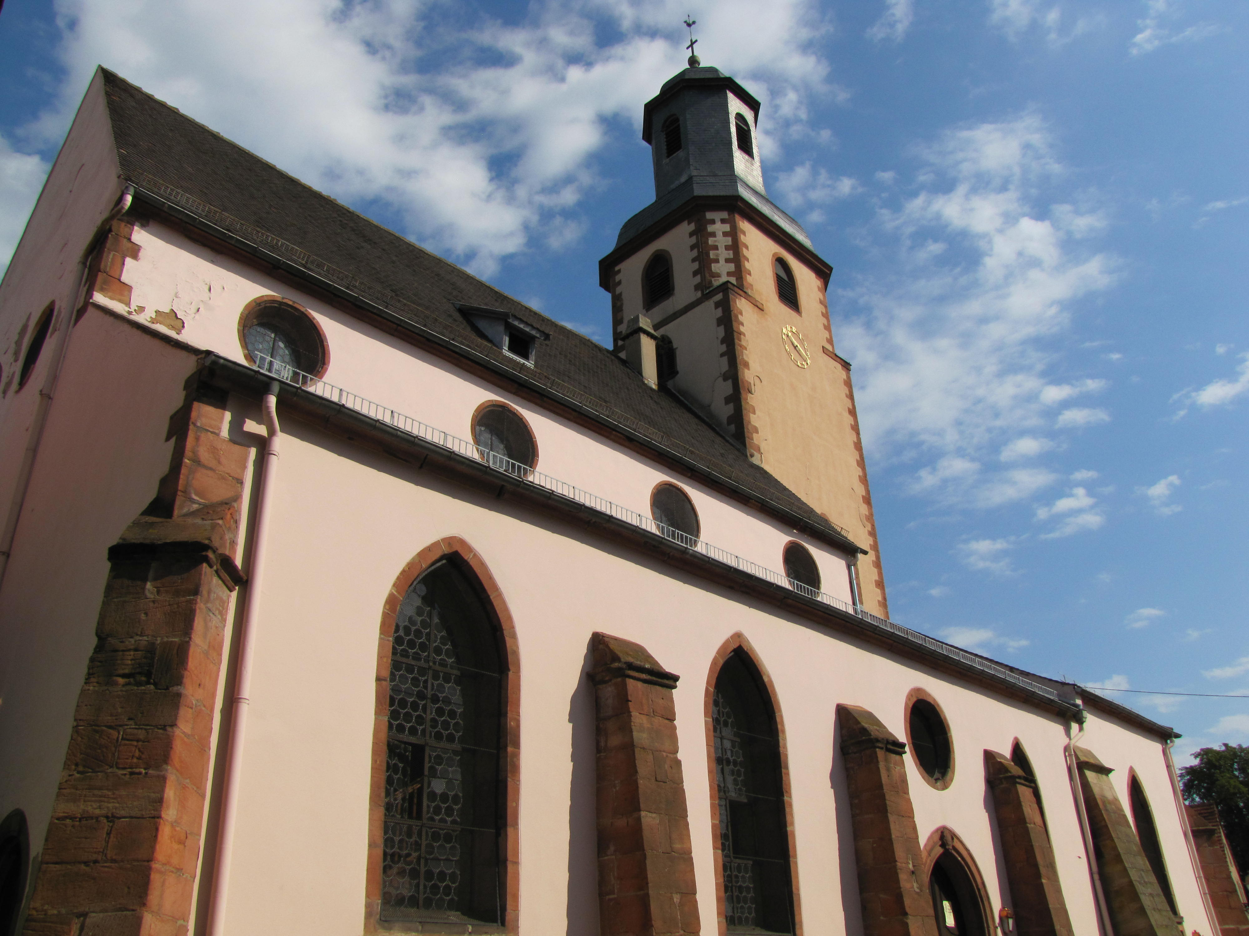 Alsace, Bas-Rhin, Église protestante de Bouxwiller (PA00084645, IA67009578).